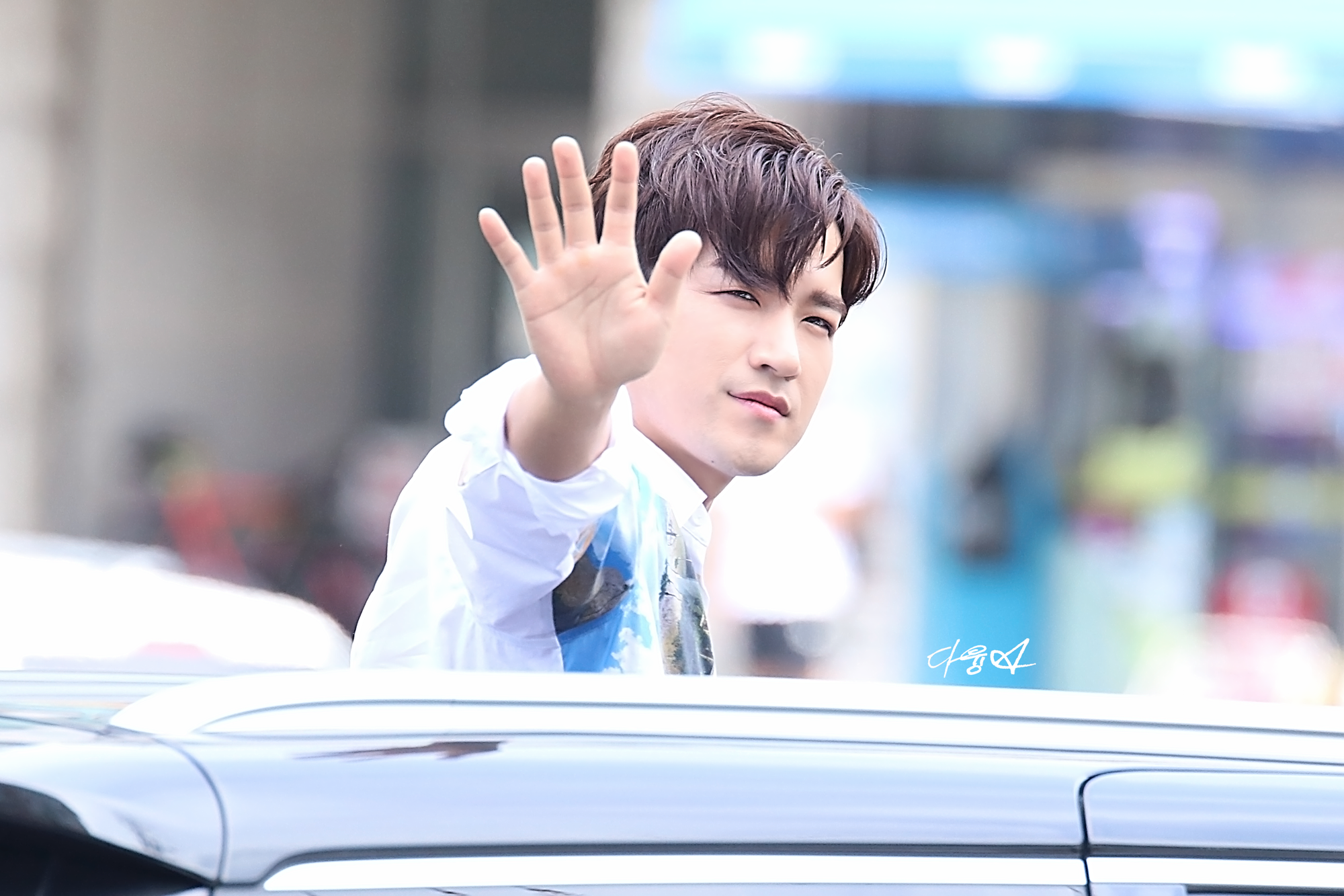 180902 인기가요 퇴근길